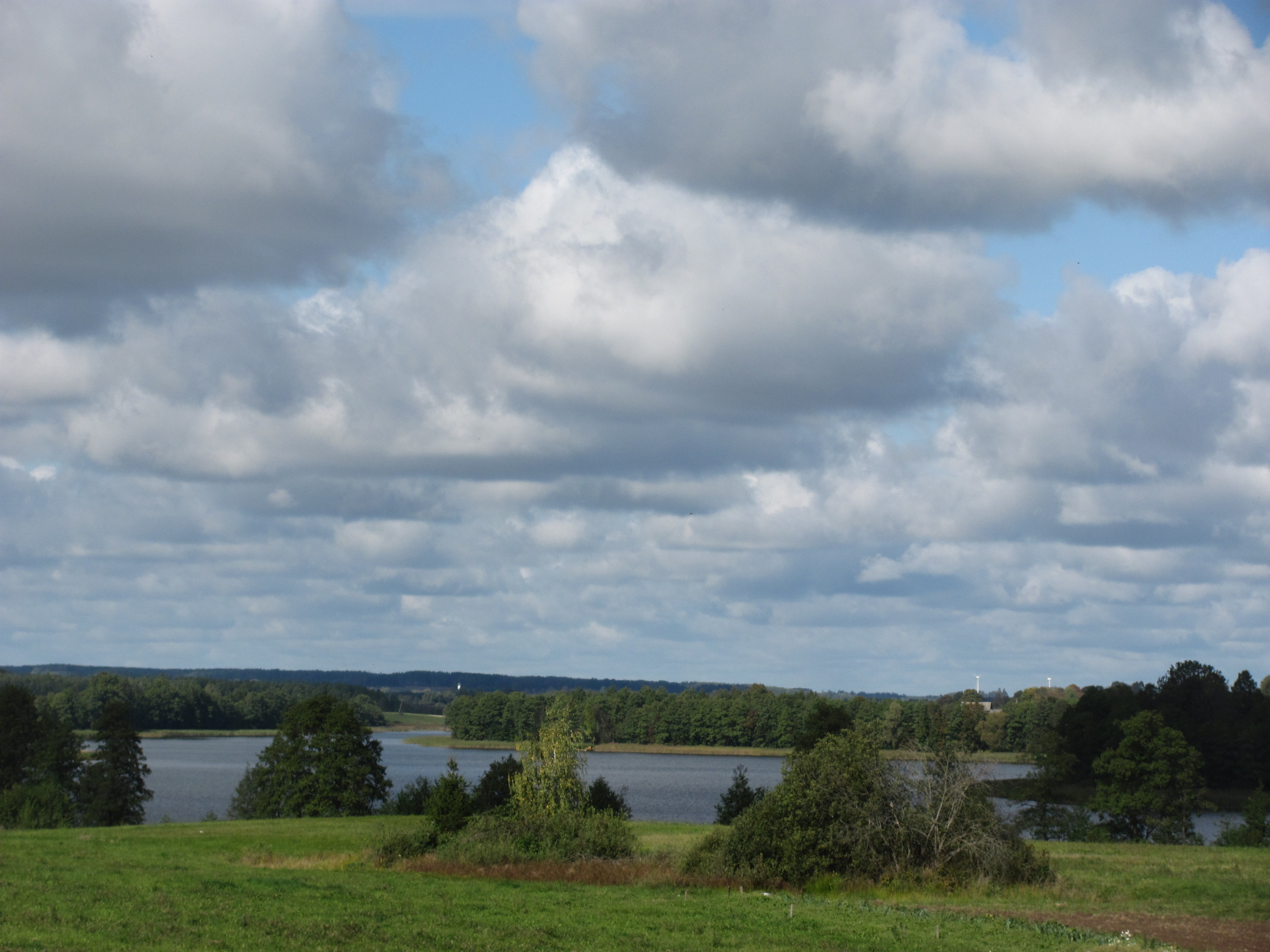 Anapolis 42261, Lithuania